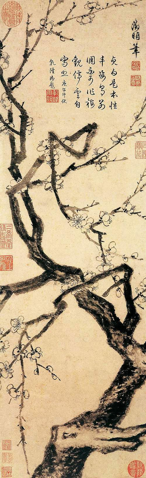 冰姿倩影图 文徵明 (明)